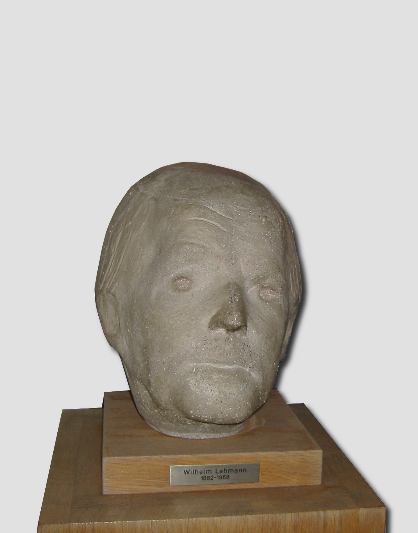 Büste Wilhelm Lehmann im Foyer der Jungmannschule